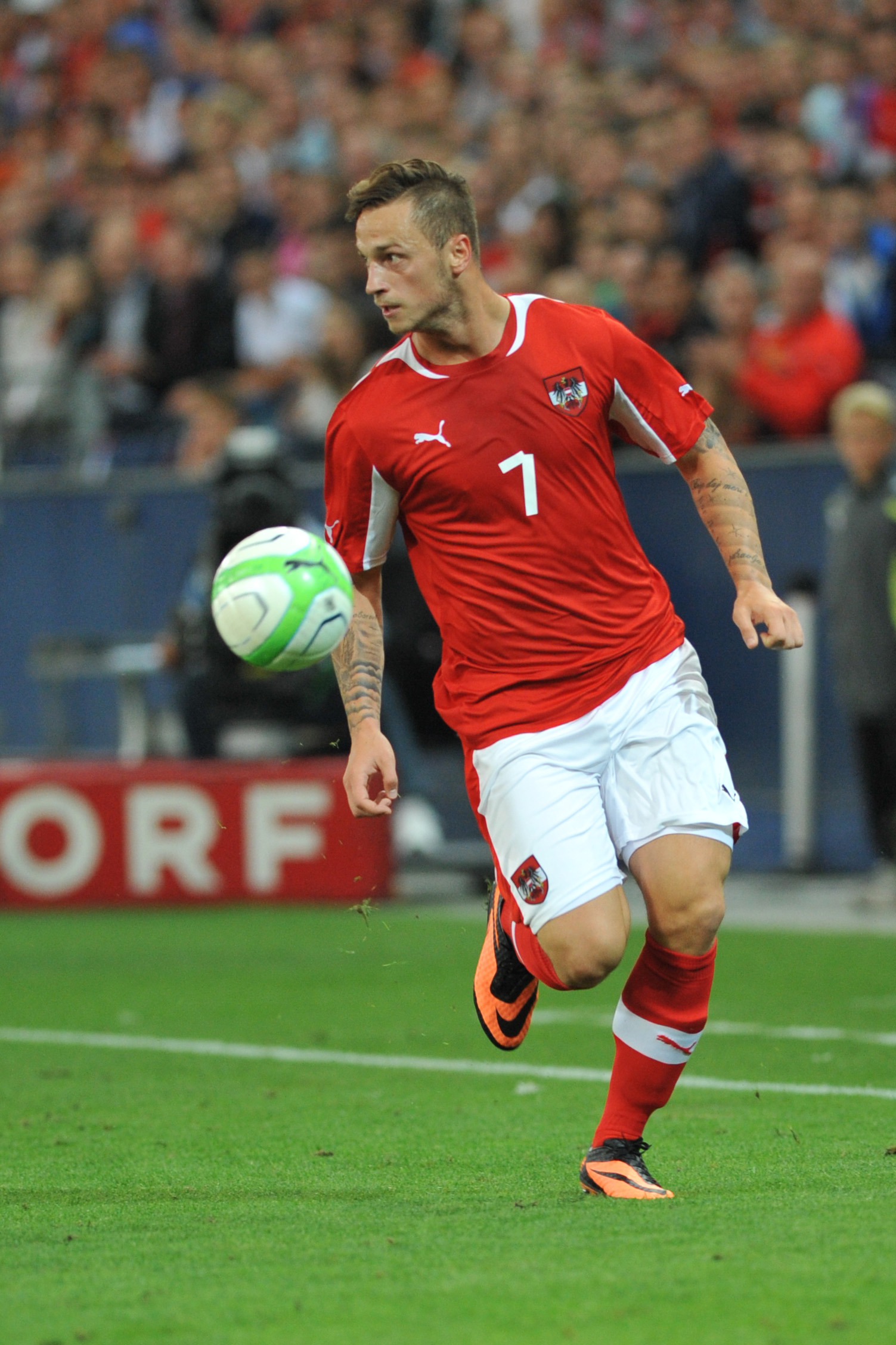 Freundschaftliches Länderspiel Österreich - Griechenland am 14. August 2013: Marko Arnautovic